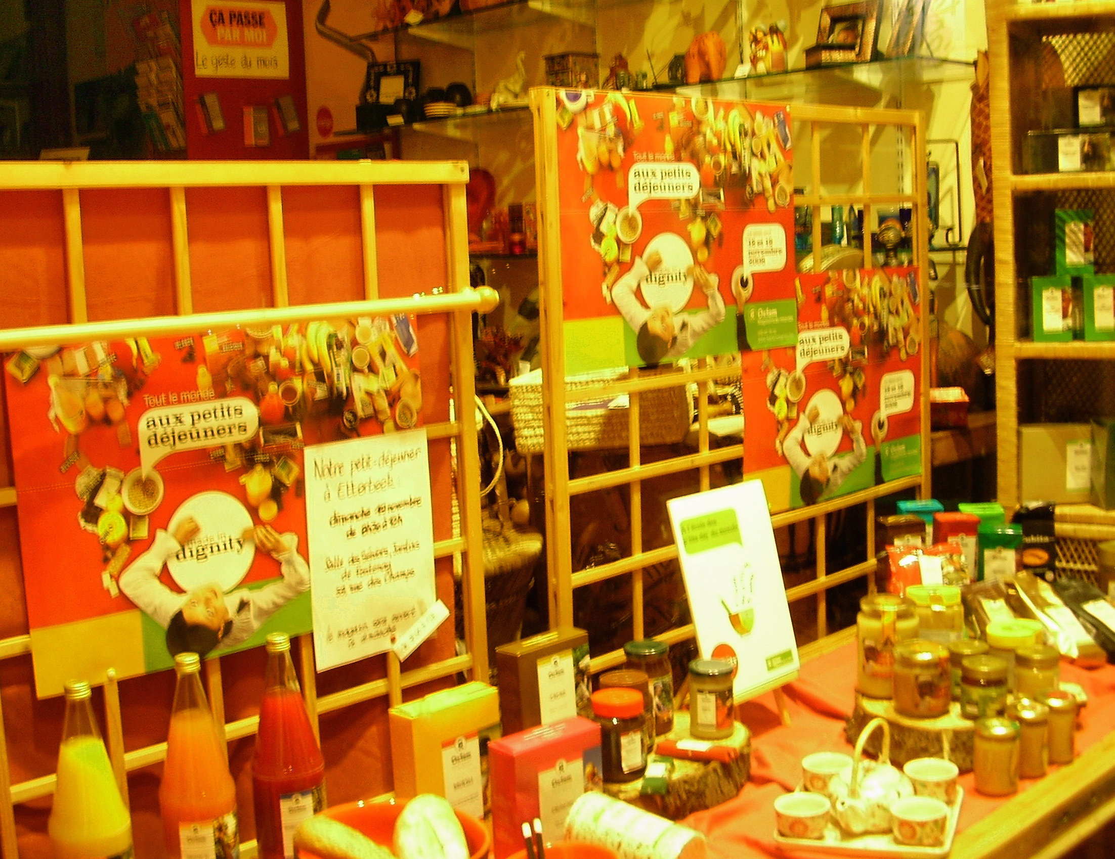 Produits du commerce équitable (Fair Trade) – Magasin du Monde – Oxfam, Bruxelles